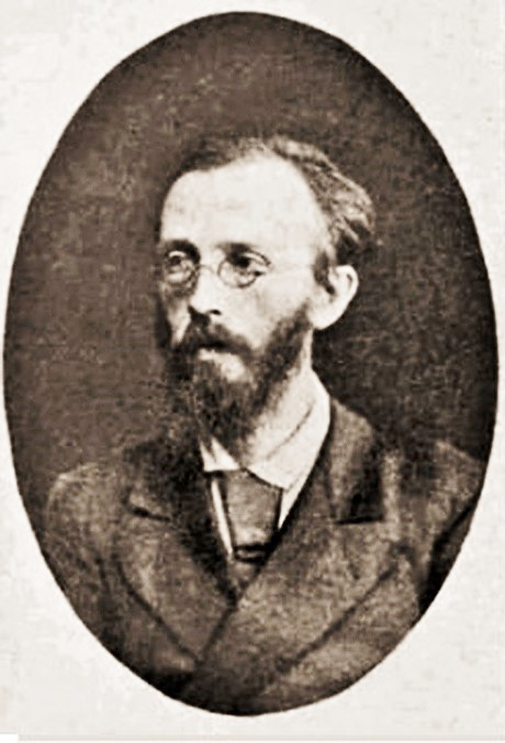 Nikolaj V. Kletochnikov